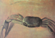 Gravura de caranguejo encontrada no livro Theatrum Rerum Naturalium Brasiliae, domínio público.